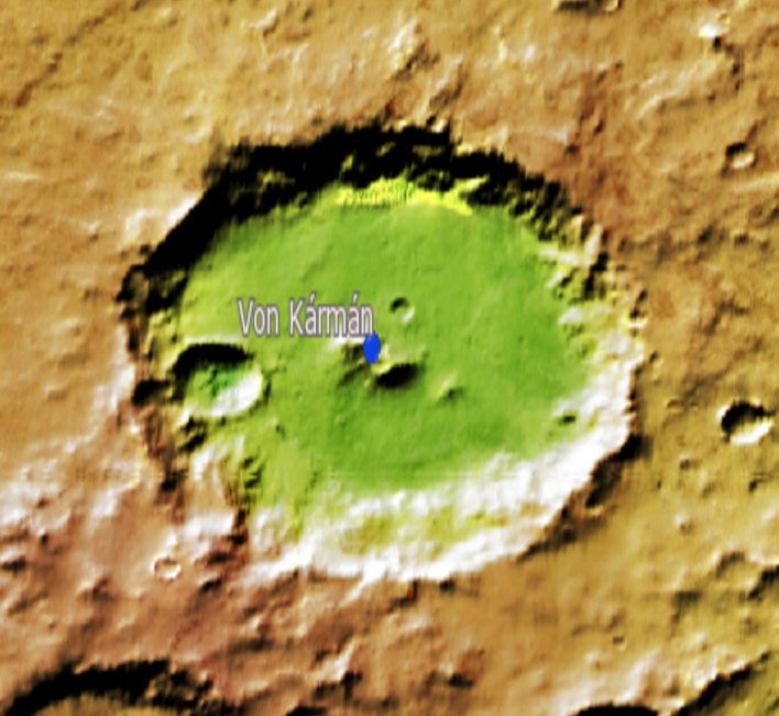 Cráter marciano . (Imagen IAU/USGS/Goddard/A SU/USGS)